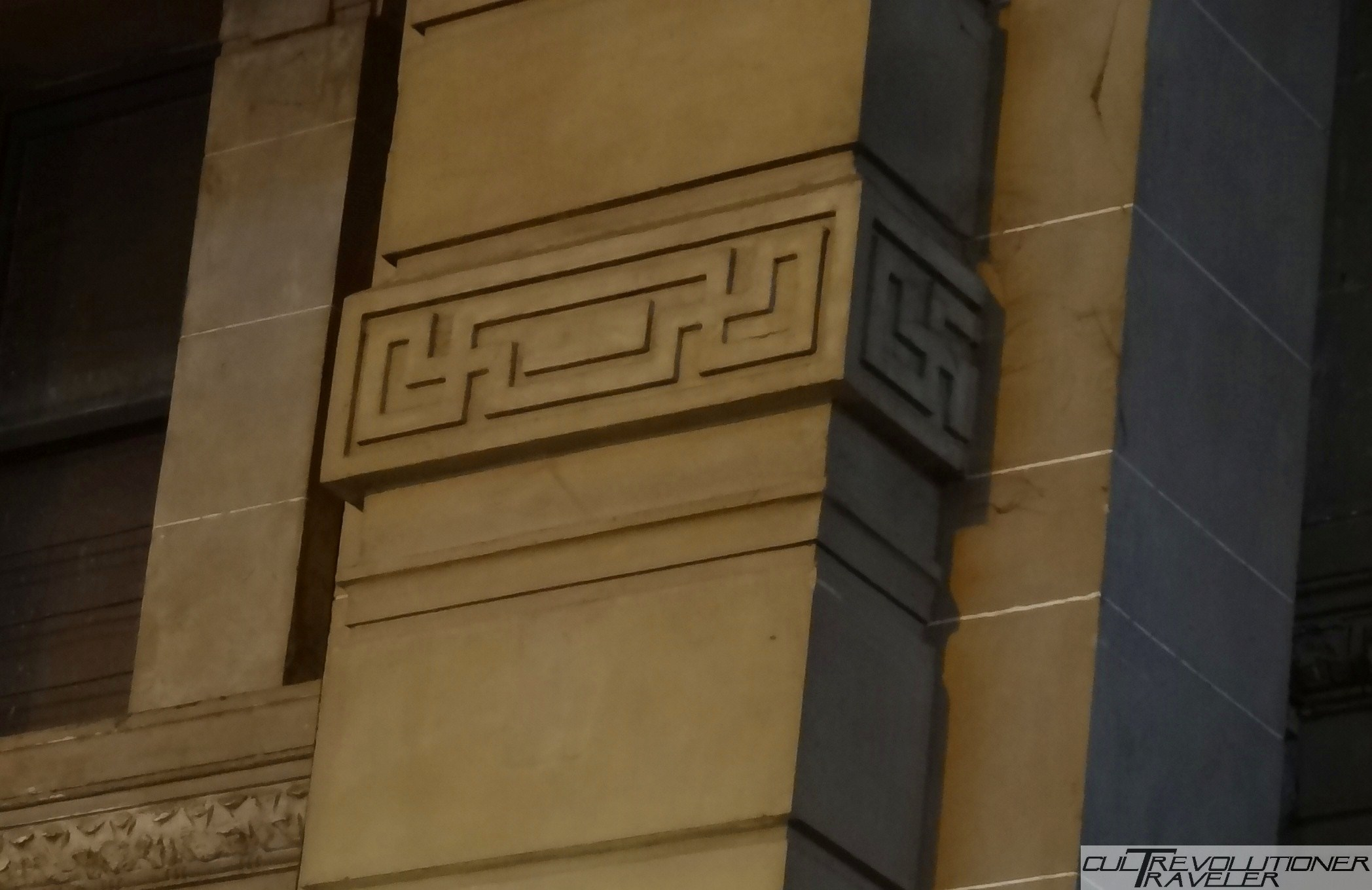 detalle de las columnas interiores en la estacion Retiro del Ferrocarril Mitre en la ciudad de Buenos Aires, Argentina.